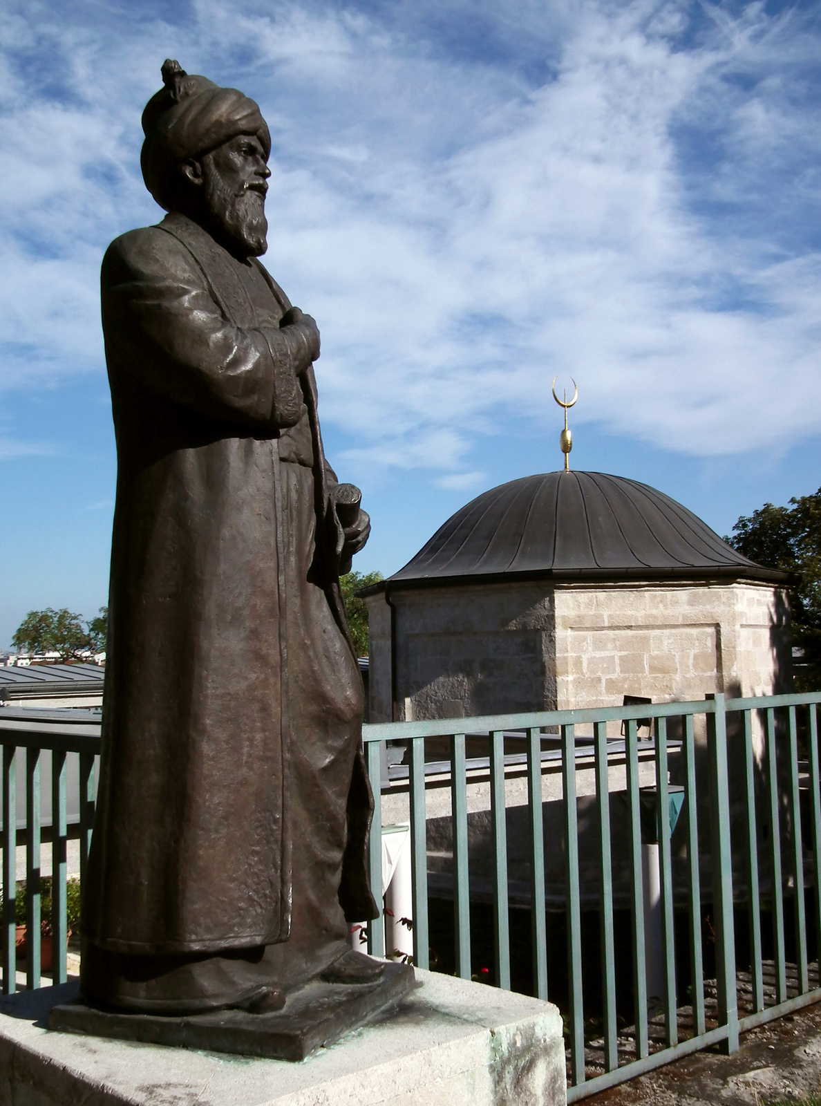 Gül Baba türbéje (Budapest 2, Mecset utca 14., Mecset utca 18-20.) This is a photo of a monument in Hungary. Identifier: 290